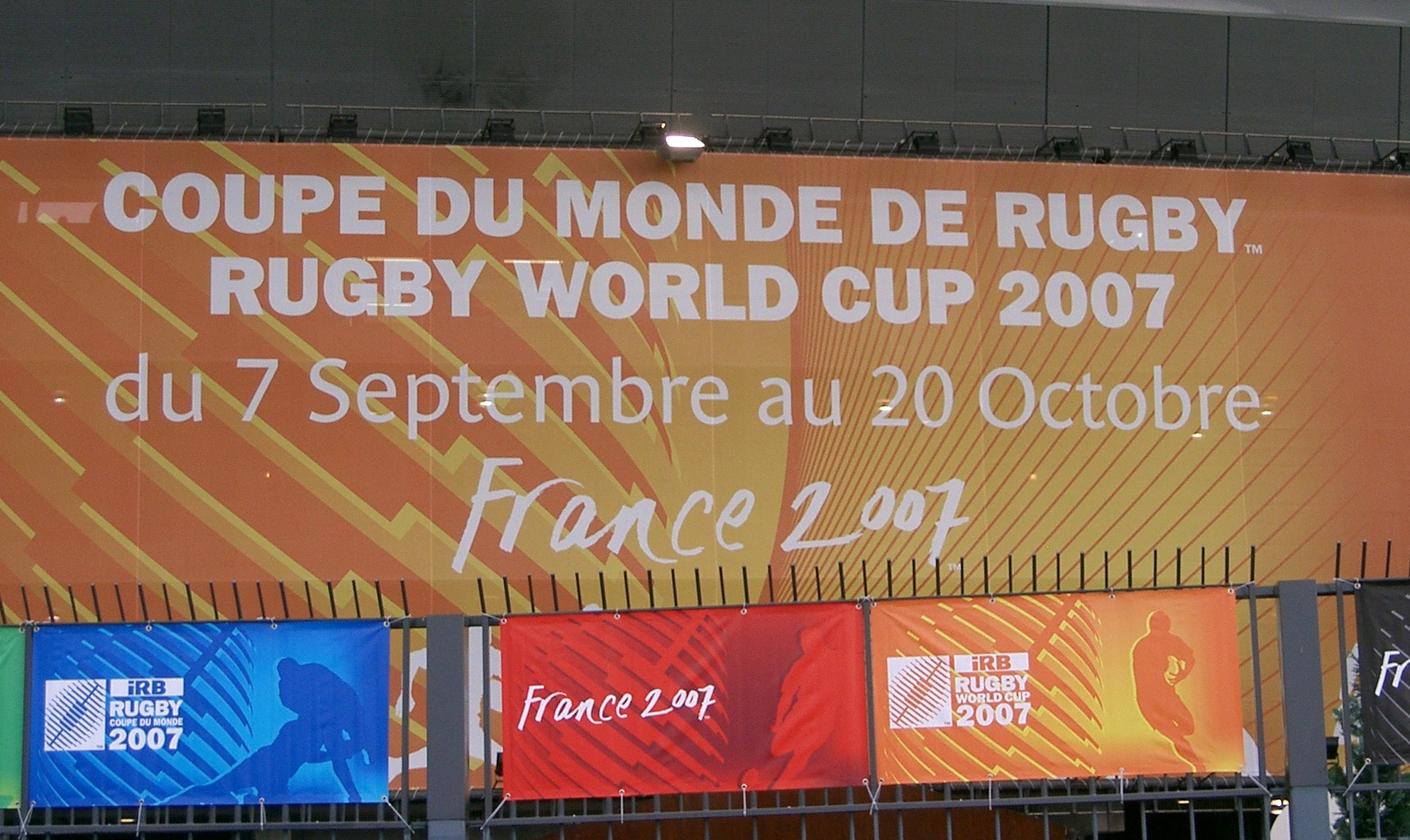 Panneau coupe du monde de rugby 2007 - Stade de France